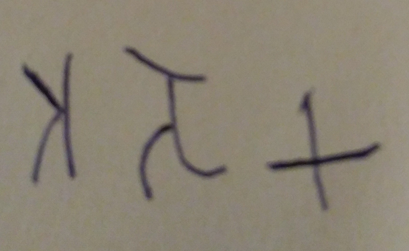 Inscription of the name of Ashoka in Minor Rock Edicts was found in Maski archaeological site of Karnataka state.